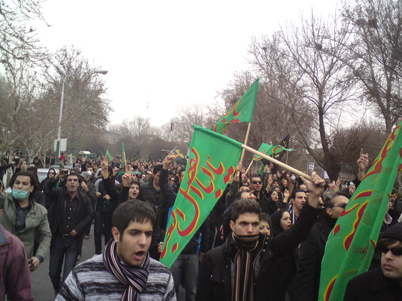 راهپیمایی جنبش سبز در روزعاشورا در بلوار کشاورز